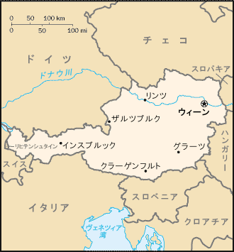 オーストリア地図 - CIA Factbookより日本語化 掲載地名: ウィーン、インスブルック、ザルツブルク、クラーゲンフルト、グラーツ、リンツ、ヴェネツィア湾、ドナウ川